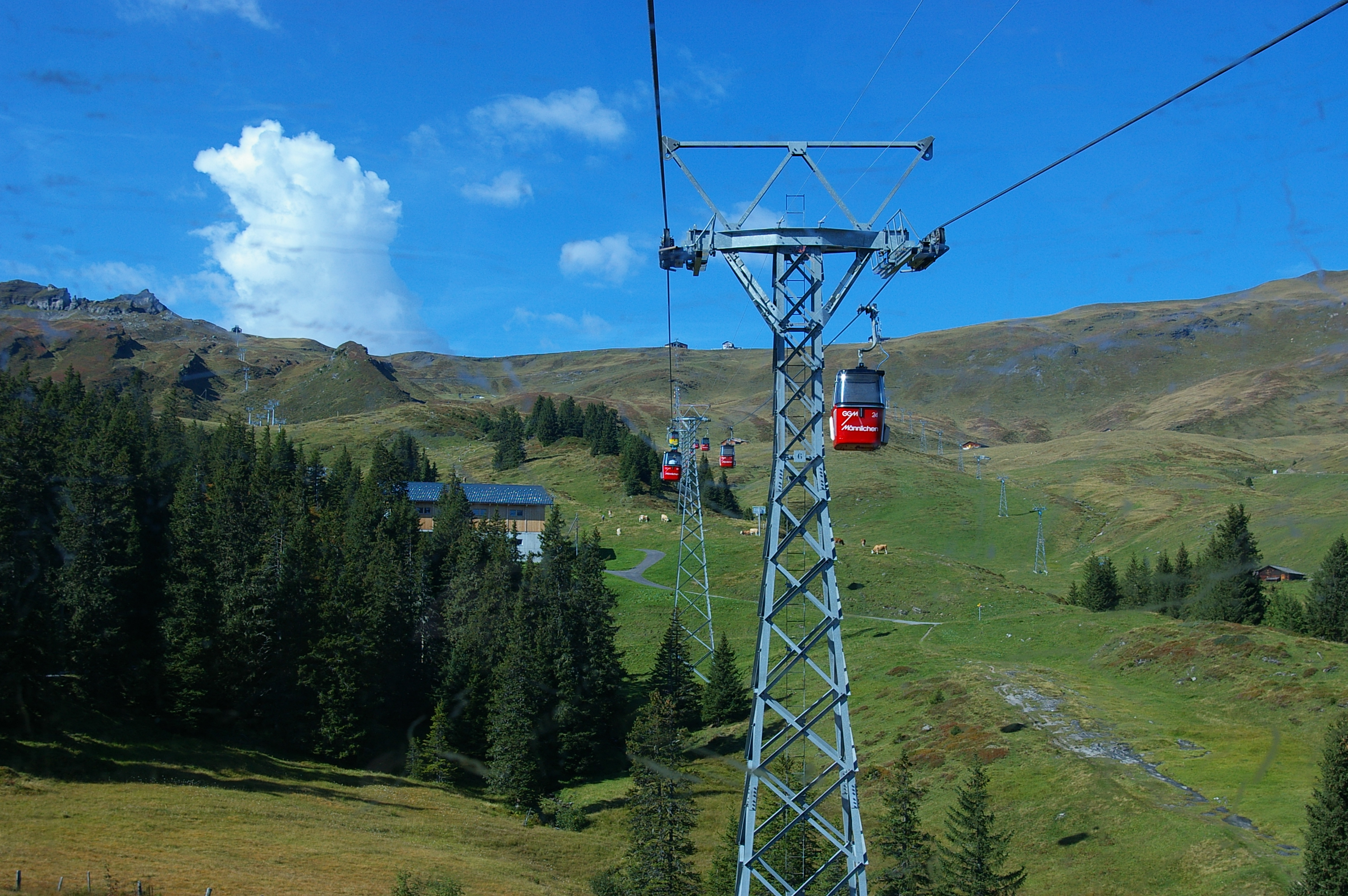 Die Gondelbahn Grindelwald-Männlichen in der Schweiz. Längste Gondelbahn der Welt. Obere Sektion, kurz vor der Bergstation.